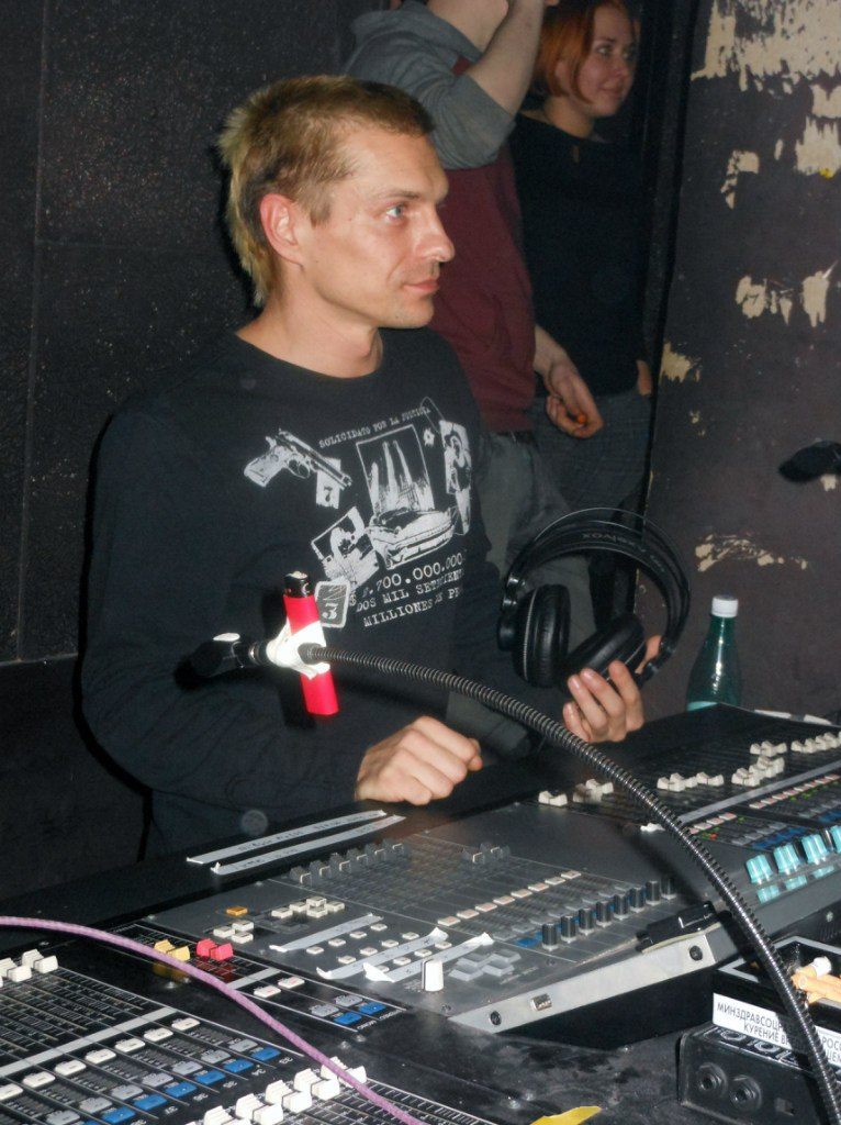 Станислав Марков за микшерным пультом